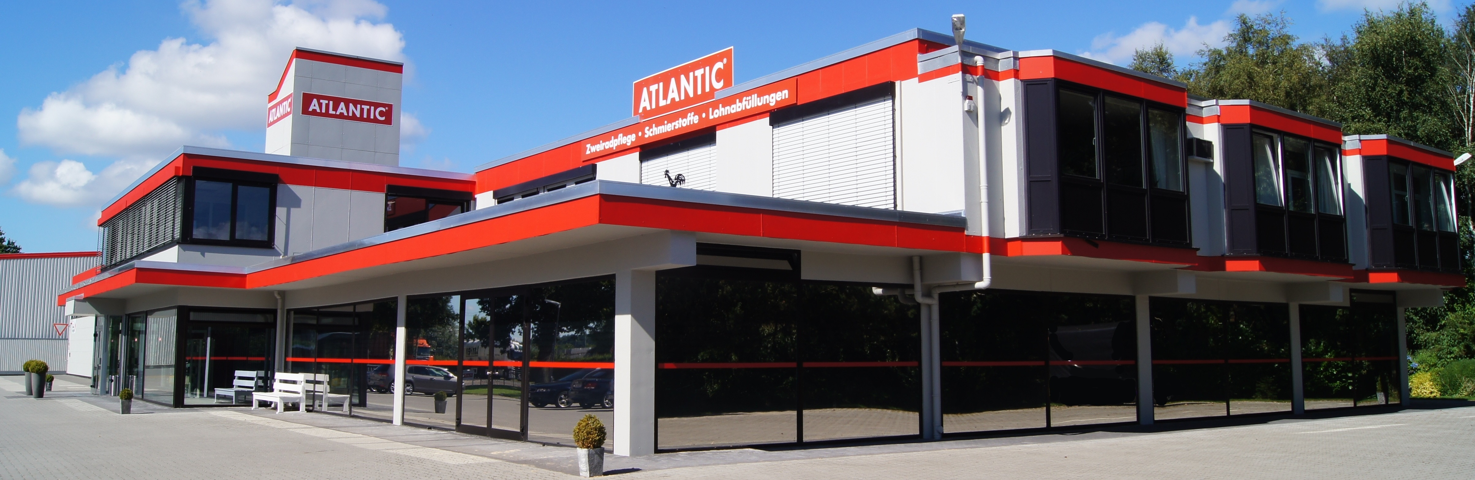 atlantic oel in dollern